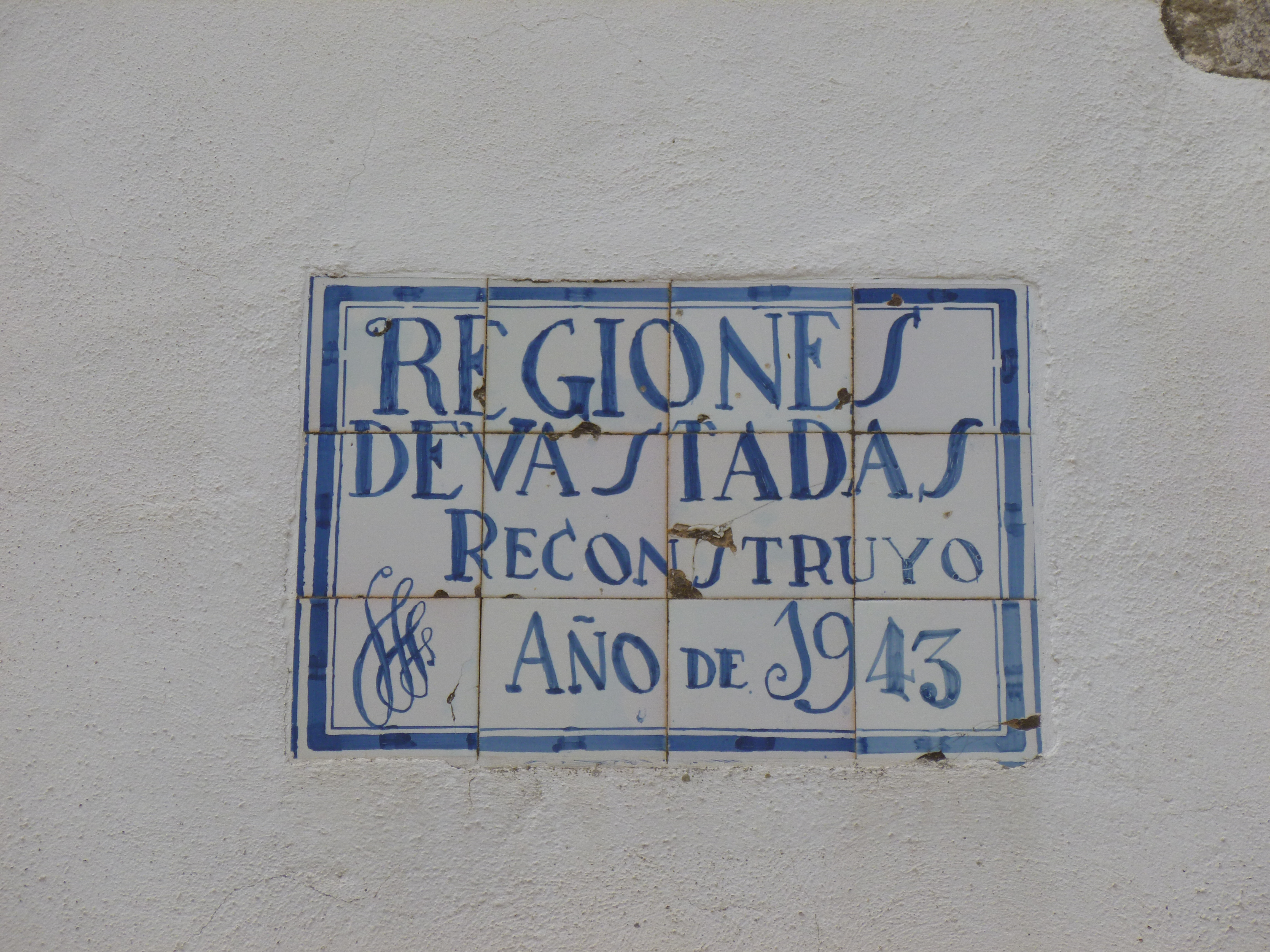 Ermita de la Magdalena, Moncofa 06.077-003.